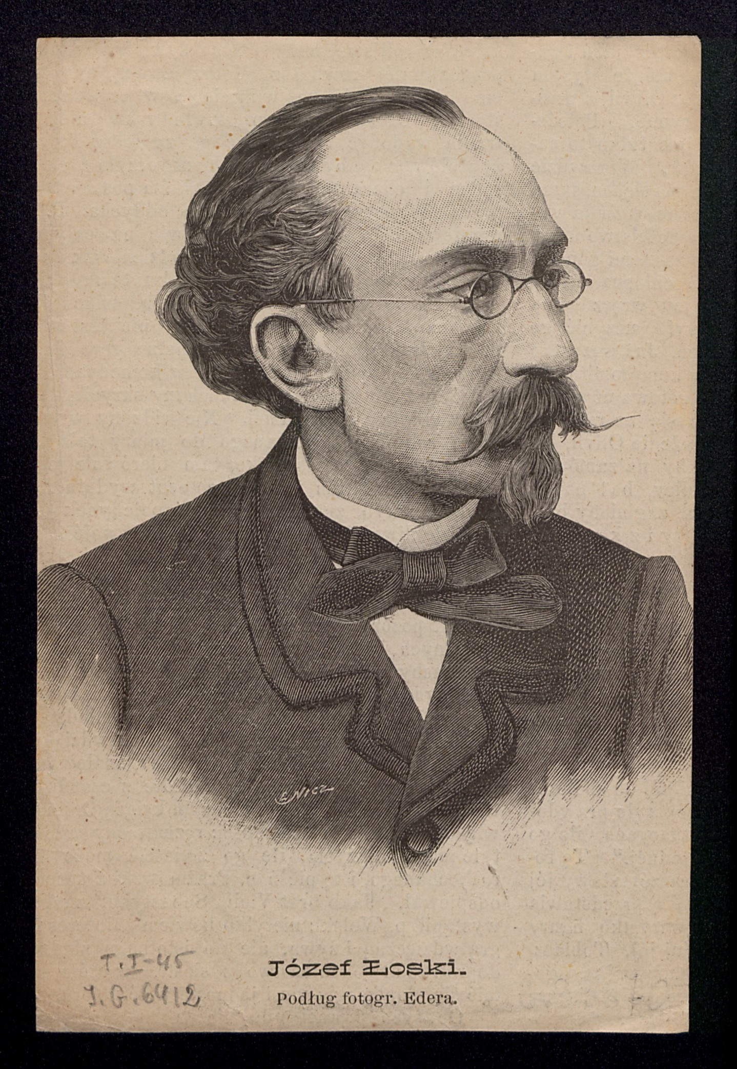 Józef Łoski, 1885 r.